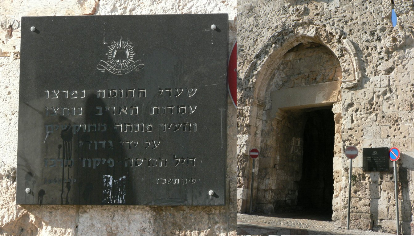 Zion gate, Jerusalem, opened and cleared by Israel Engineering Corps during the Six Days War, 1967 שער ציון, נפרץ ונוקה ממוקשים על ידי חיל ההנדסה הישראלי לוח בשער ציון לזכר פעילות חיל ההנדסה הישראלי בקרב על ירושלים במלחמת ששת הימים